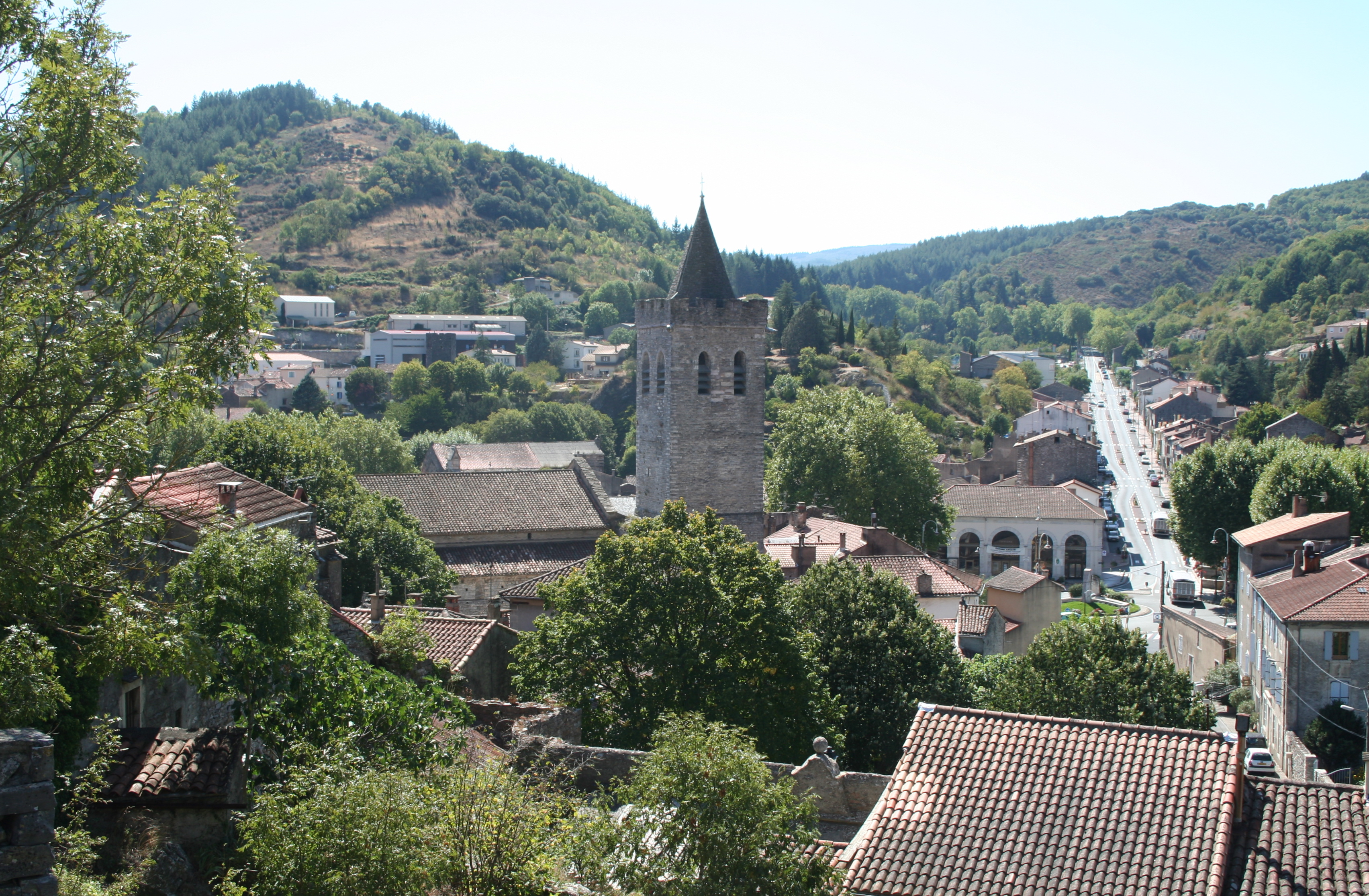 Saint-Pons-de-Thomières (Hérault) - Vue générale sur la ville et la cathédrale.